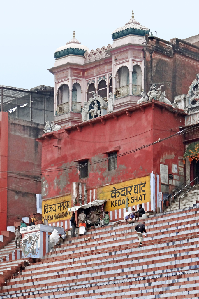 Le Kedar ghat et le temple de Shiva En haut du Kedar Ghat, se trouve un temple consacré à Shiva qui est fréquenté par les indiens du sud et par les Bengalis. L'édifice a été construit par le Maharaja de Vijayanagar. _________________ Varanasi, autrefois appelée Bénarès, est située au bord du Gange, à la confluence des fleuves Varunā et Assī. C'est l'une des plus importantes villes sacrées de l'Hindouisme. Son nom traditionnel est Kâshî, la cité lumineuse de Shiva. Varanasi est la Ville-lumière et la Ville-du-Savoir, consacrée à Shiva. Le Linga-d'Eau y est vénéré. La ville est célèbre pour ses ghāts, qui sont des berges recouvertes de marches de pierres permettant aux dévots hindous de descendre au fleuve pour y pratiquer ablutions et pūjās. Sur certains ghāts, les crémations sont rituellement pratiquées. Article de Wikipedia sur Varanasi Mythes et Dieux de l'Inde, Daniélou, Flammarion, 1992